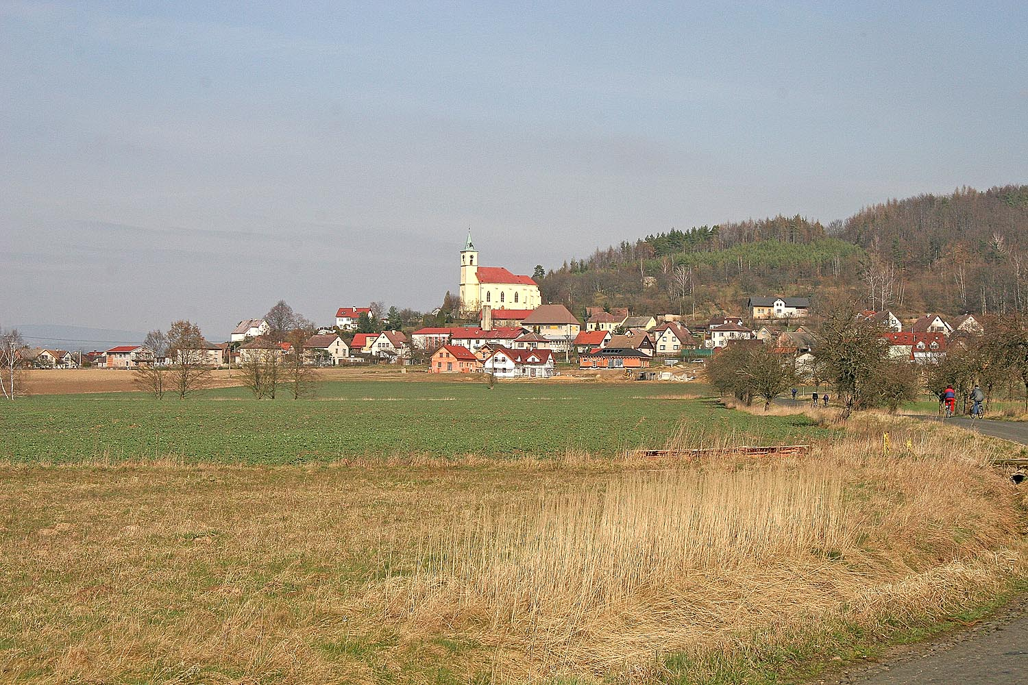 Pohled na obec Všeň ze silnice ze Žďáru, district Semily, Czech Republic autor:Prazak date: 11. 3. 2007